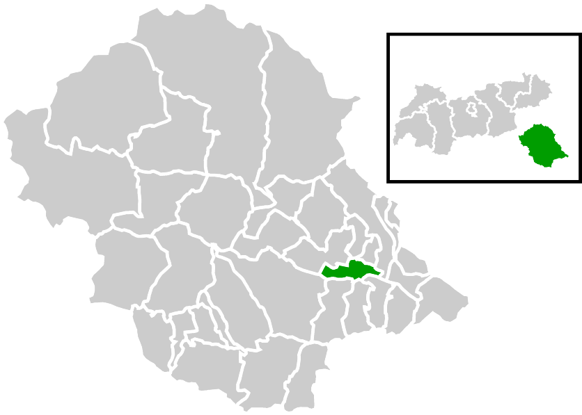 Lage der Gemeinde innerhalb des Bezirks Lienz